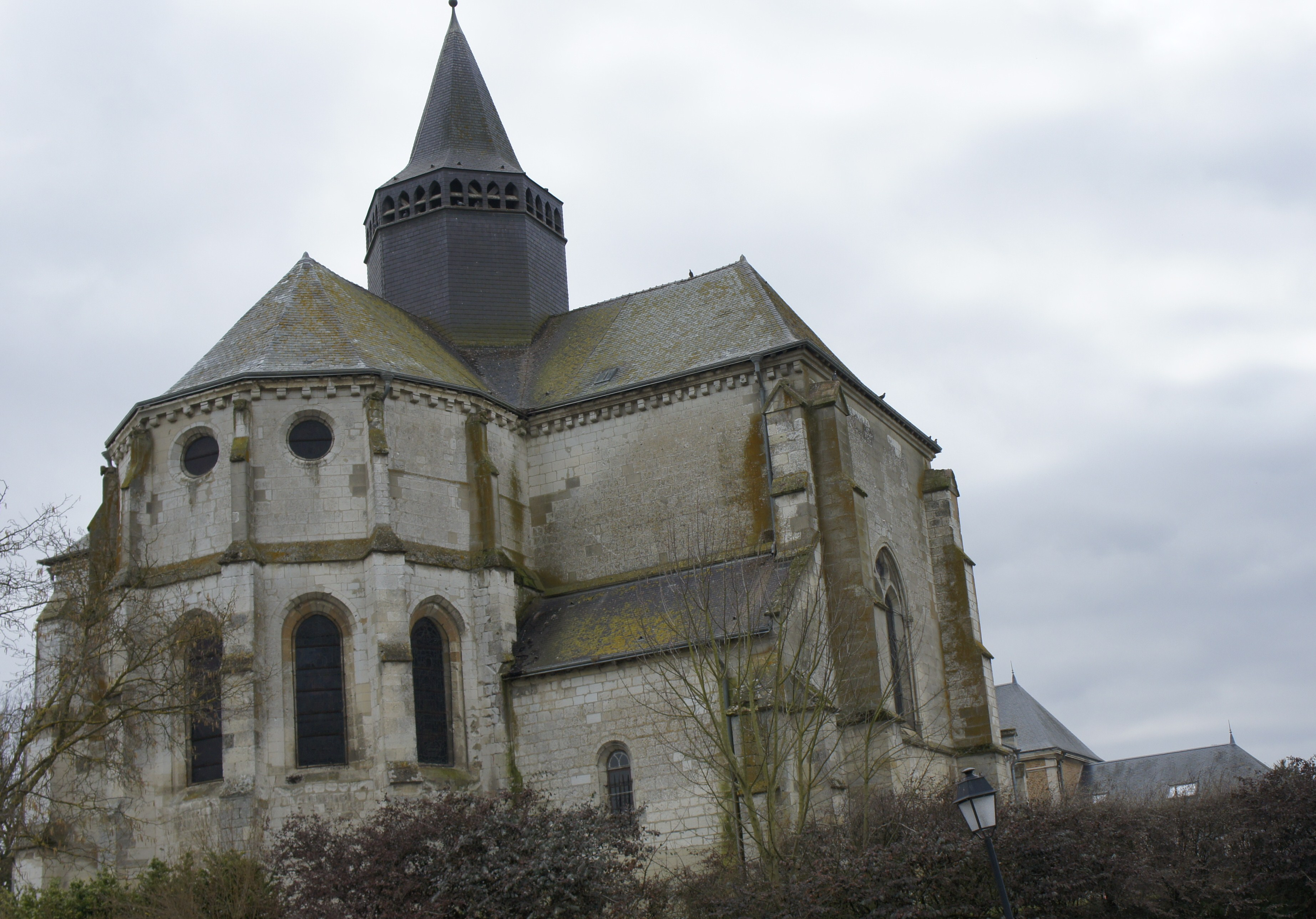 Vue du coeur de l'Église st-Remi d'Avançon. This building is en partie classé, en partie inscrit au titre des Monuments Historiques. .